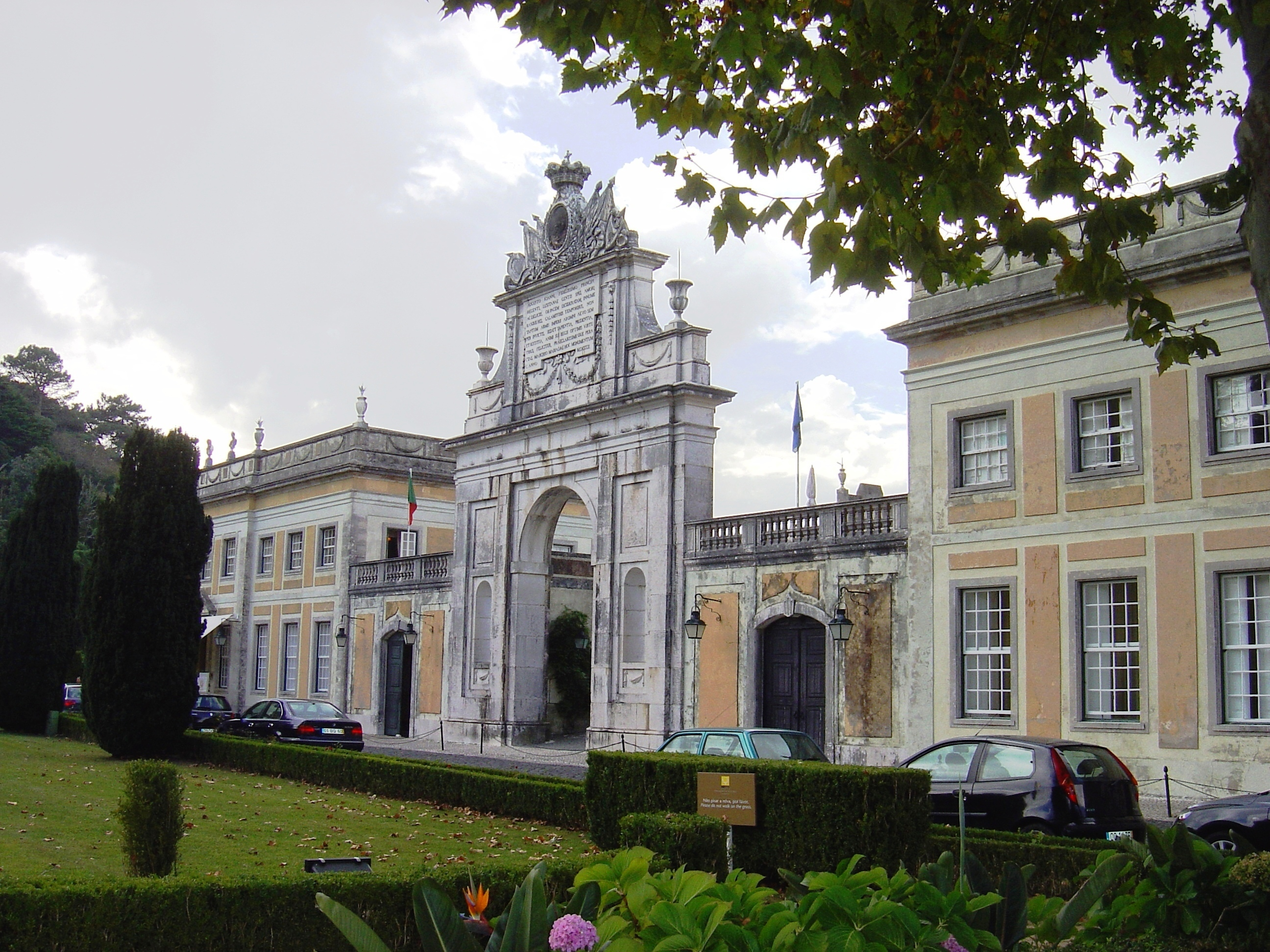 Seteais Palace, Sintra, Portugal